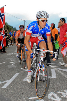 Sylvain Chavanel ascendiendo Luz-Ardiden en el Tour 2011